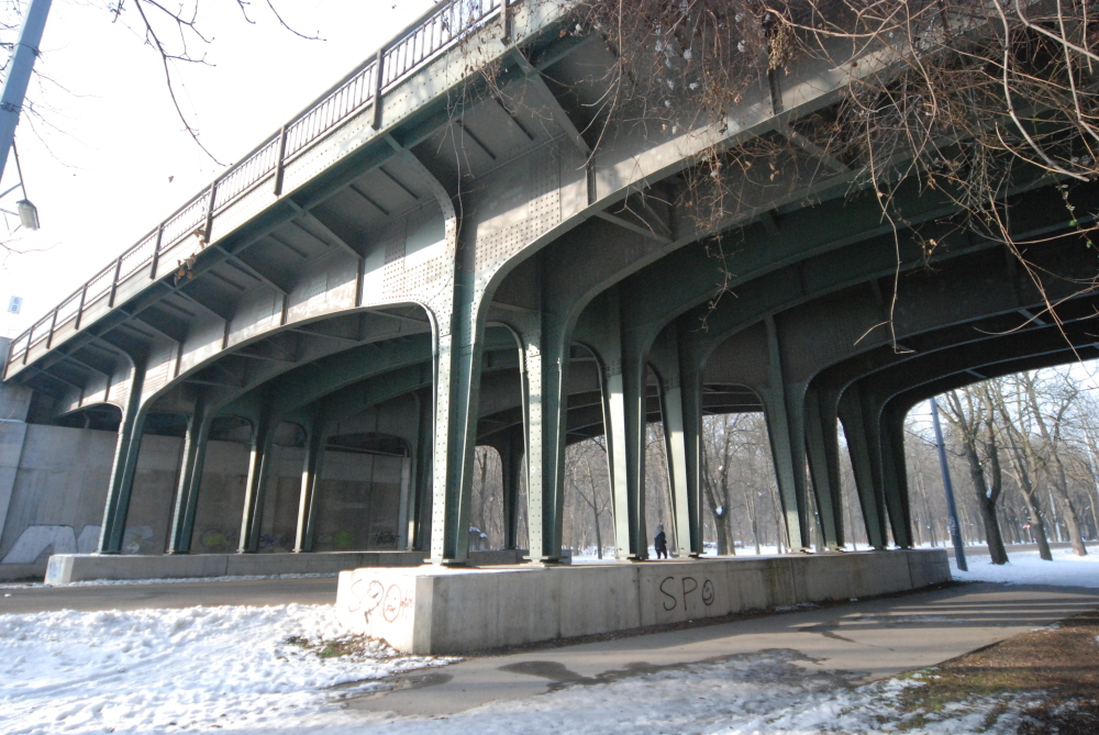 Die Brücke über die Hauptallee im 2. Wiener Gemeindebezirk Leopoldstadt, Ansicht des Tragwerks